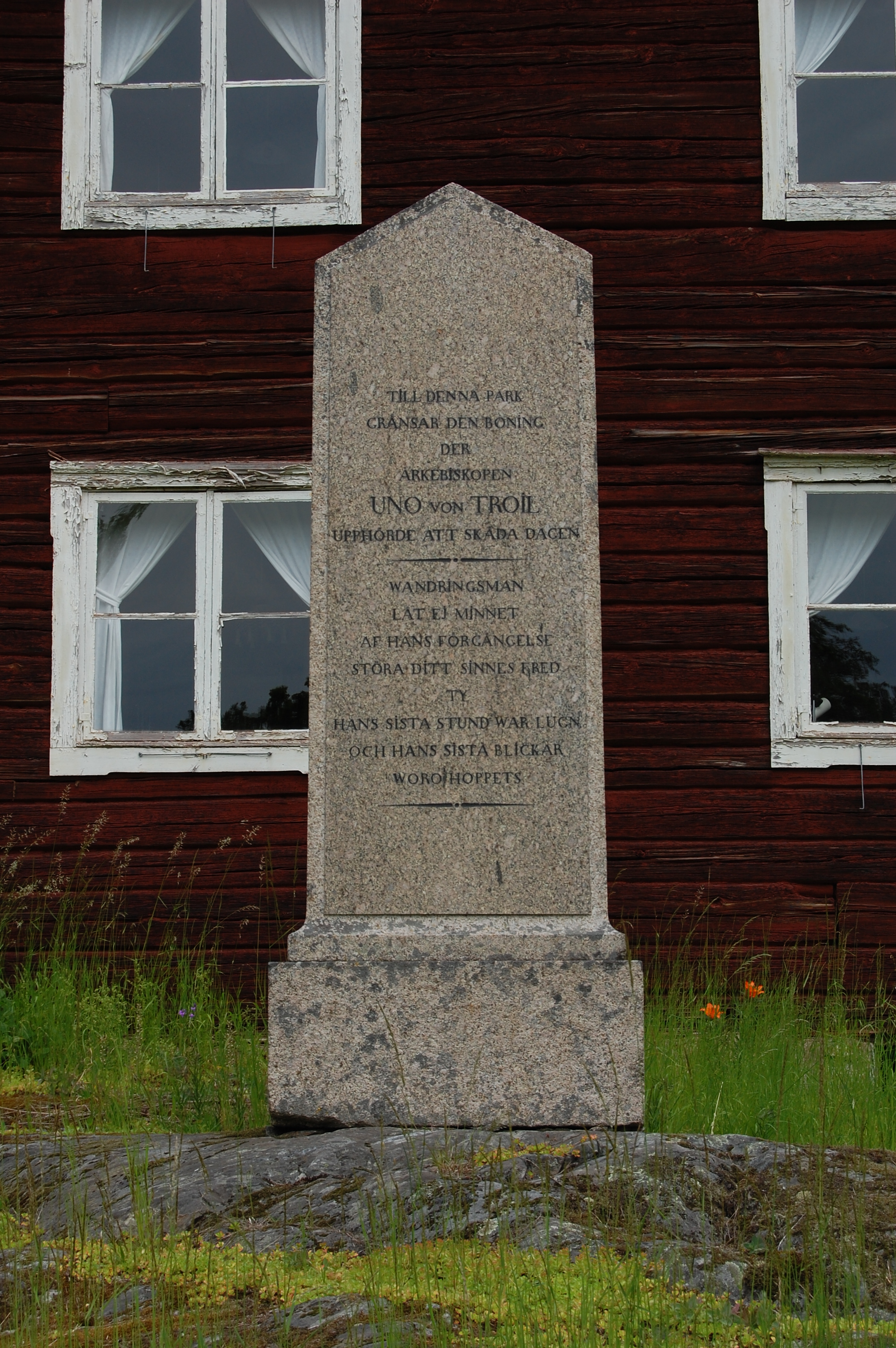 Minnessten för Uno von Troil på Sätra brunn (kurort), tillverkad i granit, belägen bakom Nybygget där biskopen bodde under sin brunnsvistelse under århundradets tre första år. Rest av hans svåger, överste P.R. Tersmeden på Ramnäs. Inskriptionen författades av skalden Adlerbeth, med texten "Till denna park gränsar den boning där ärkebiskopen Uno von Troil upphörde att skåda dagen. Vandringsman, låt ej minnet av hans förgängelse störa ditt sinnes frid, ty hans sista stund var lugn och hans sista blickar voro hoppets". (källa: Tersmeden, s. 110)